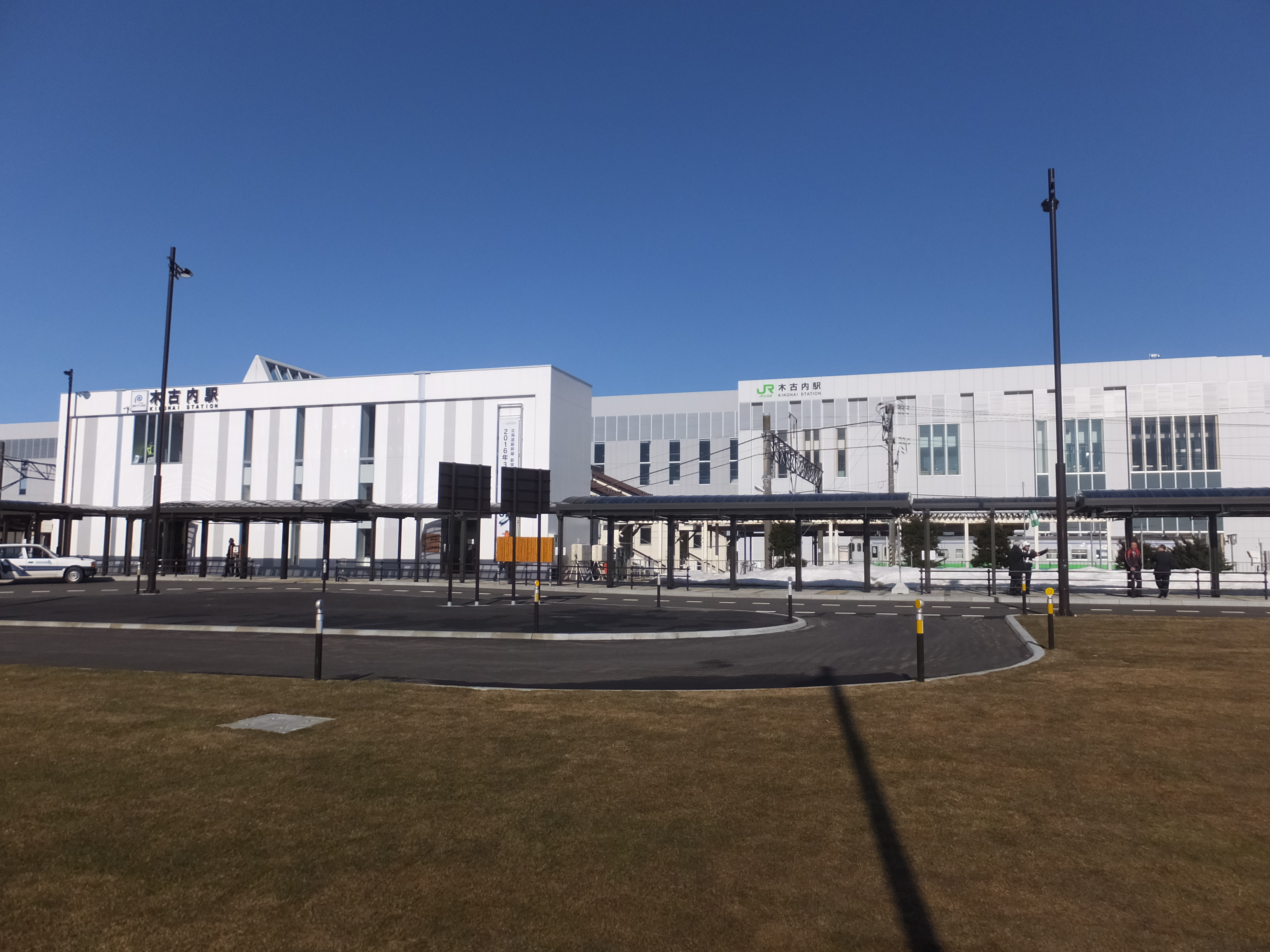 手前は道南いさりび鉄道とバス、タクシープール。奥側がJR北海道北海道新幹線